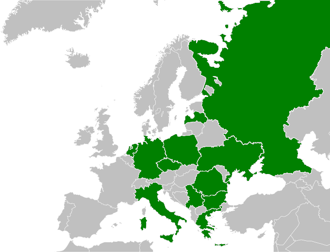 Reprezentacje biorące udział w Mistrzostwach Europy w Piłce Siatkowej Mężczyzn 1995.